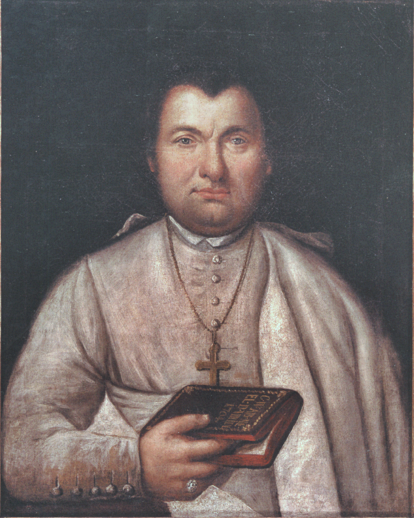 Kastulus Wohlmuth (1794-1802); Letzter Abt des Klosters Neustift in Freising